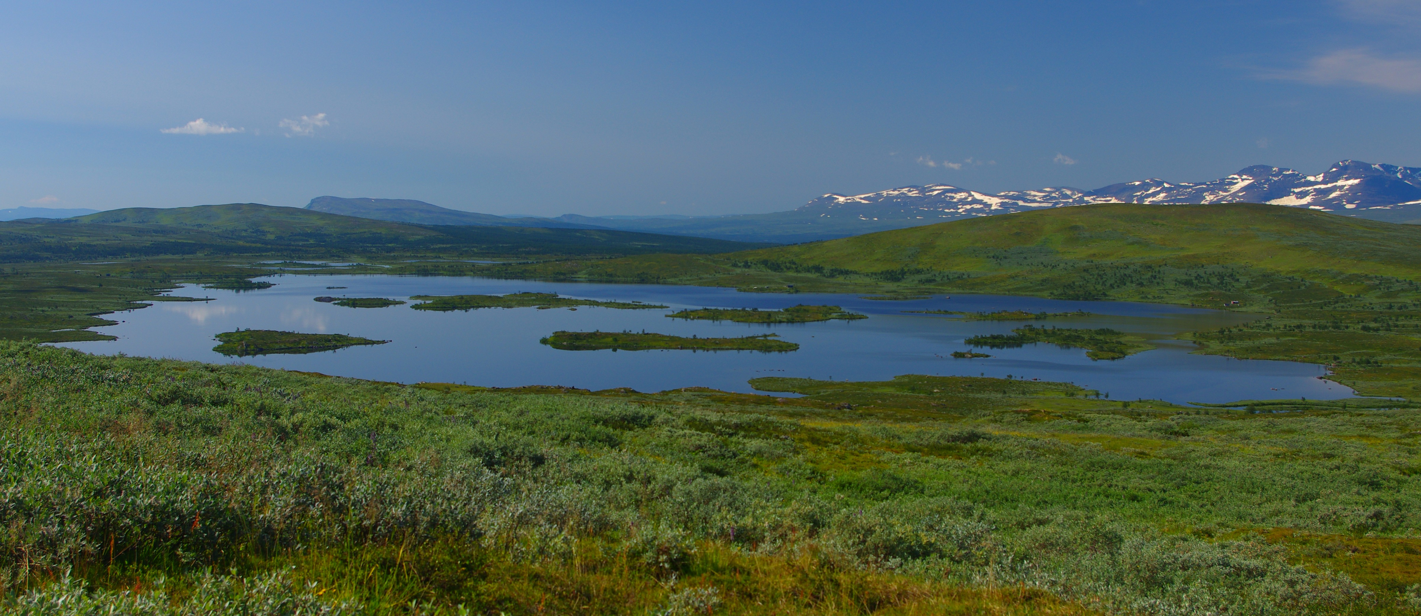 Servejaure eller Servvejávrrie är en sjö i Sorsele kommun i Lappland i Sverige. Kungsleden passerar sjön.